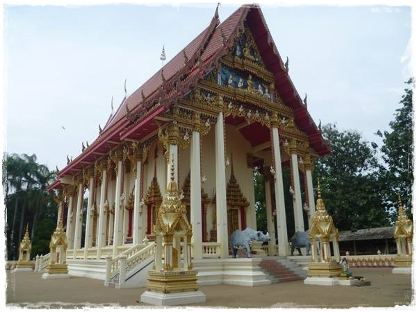 อุโบสถวัดปลักแรด